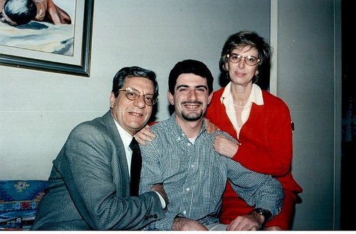 Attilio fra mamma Angela e papà Gino